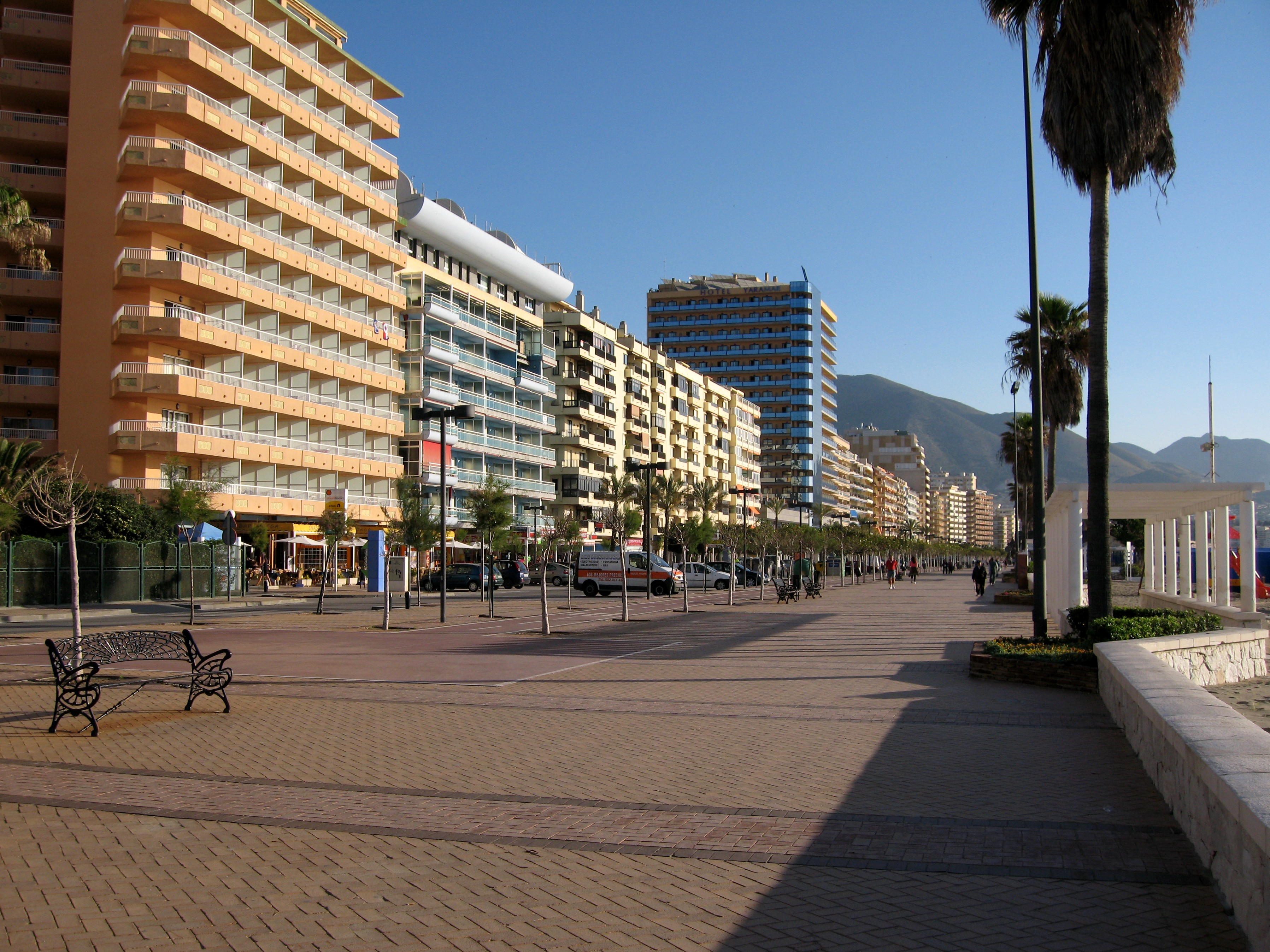 Strandpromenade von Los Boliches in Fuengirola, Provinz Málaga, Andalusien, Spanien